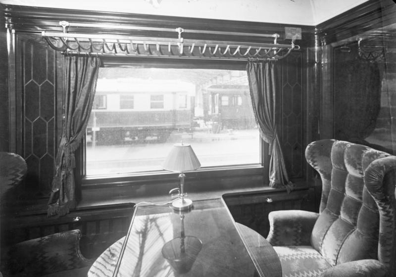 Der Rheingold-Express, welcher zwischen Hoek van Holland, Köln, Basel und Luzern verkehrt, ist jetzt zwei Jahre in Betrieb! Blick in das vornehm ausgestattete Abteil I. Klasse des Rheingold-Express.